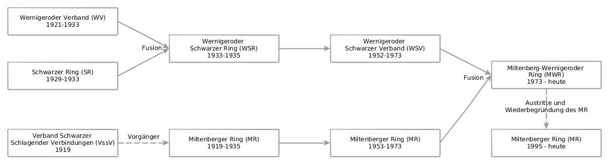 Entwicklung des Miltenberg-Wernigeroder Rings